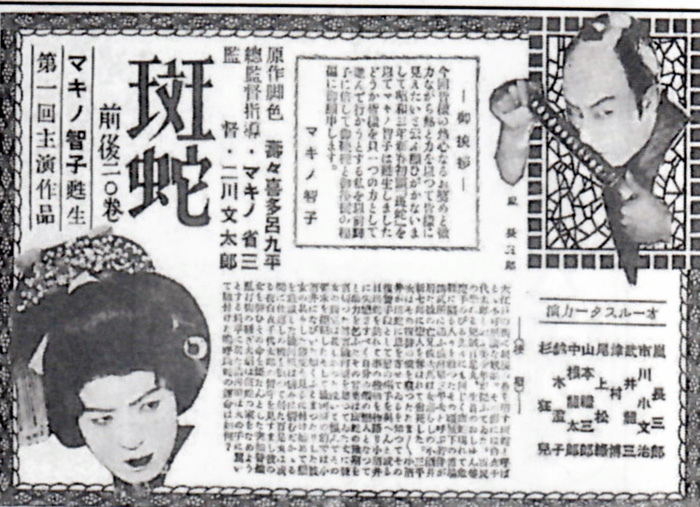 『斑蛇』（1928年）の広告。